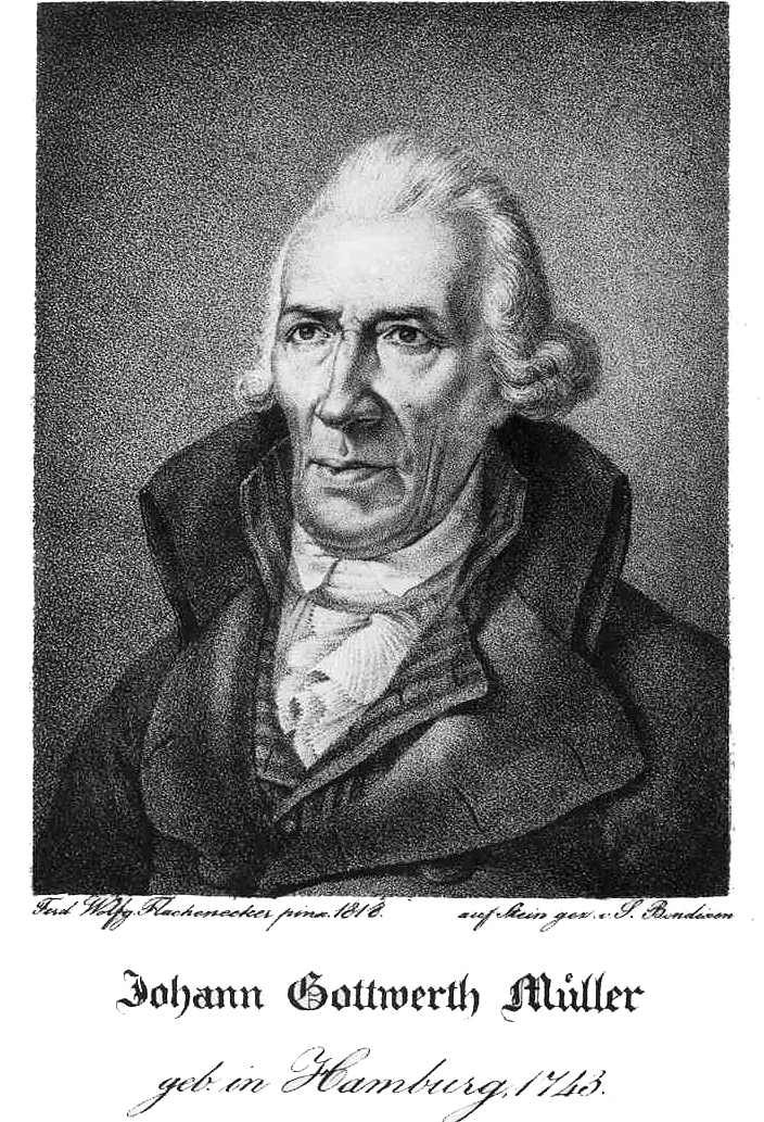 Johann Gottwerth Müller (gest. 1828), gezeichnet von Ferdinand Wolfgang Flachenecker 1818, auf Stein gez. von S. Bendixen, Stadtarchiv Itzehoe